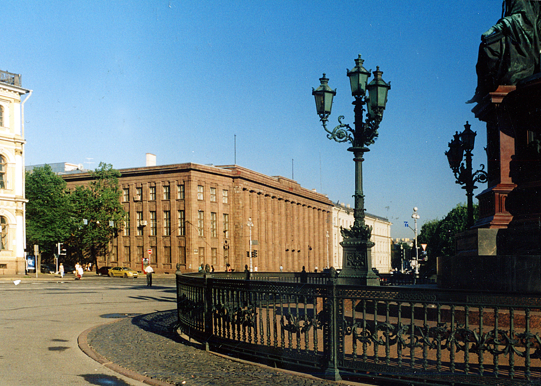 Дом немецкого посольства в С-Петербурге. Архитектор Беренс.